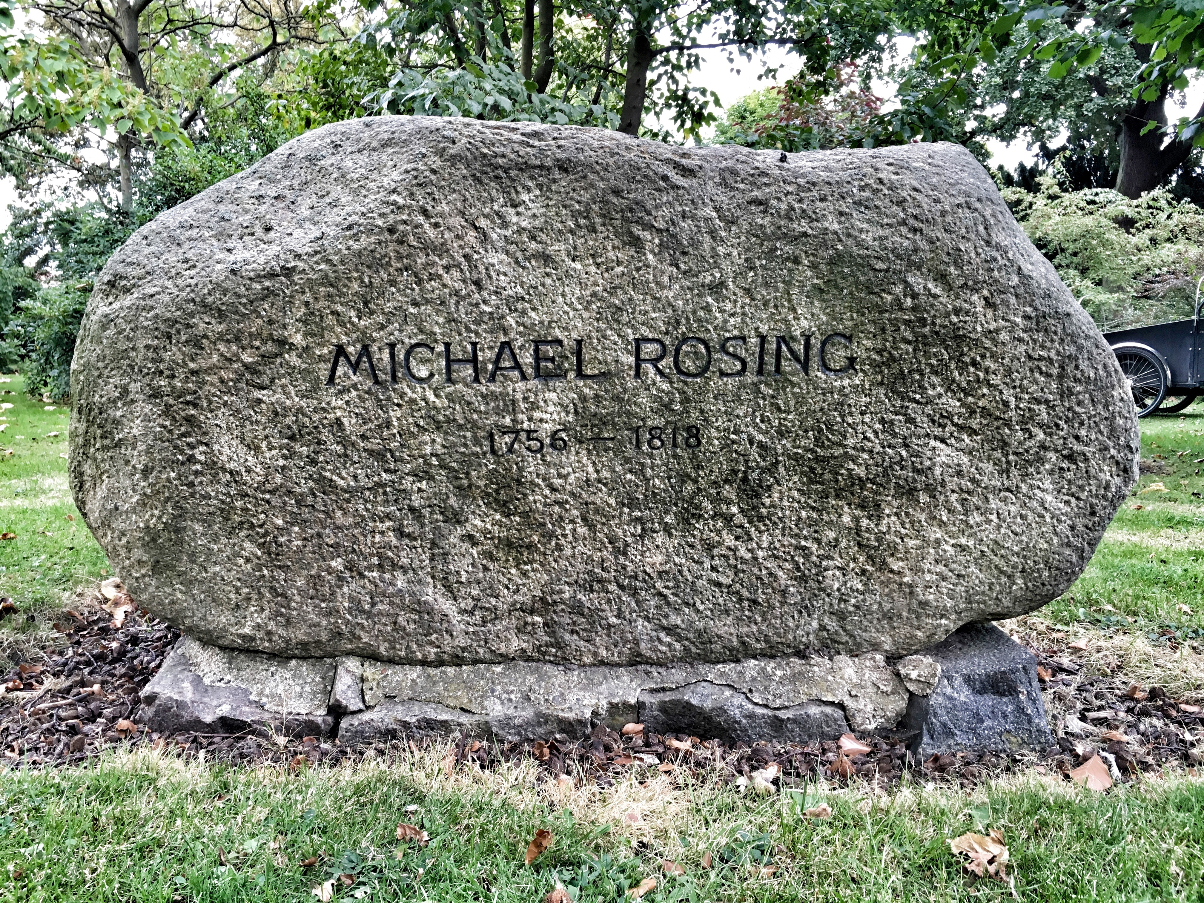 Den dansk-norske skuespiller Michael Rosings gravsten, Assistens Kirkegård, Nørrebro, København